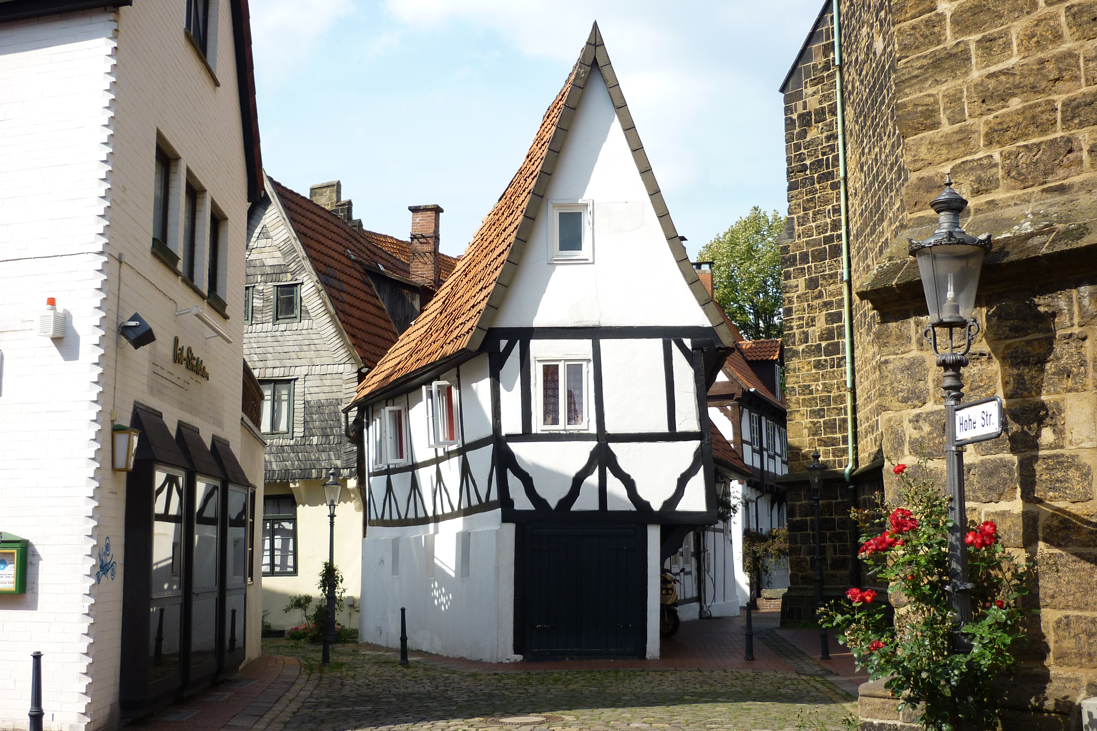 Minden: Fachwerkhäuser an der Hohen Straße